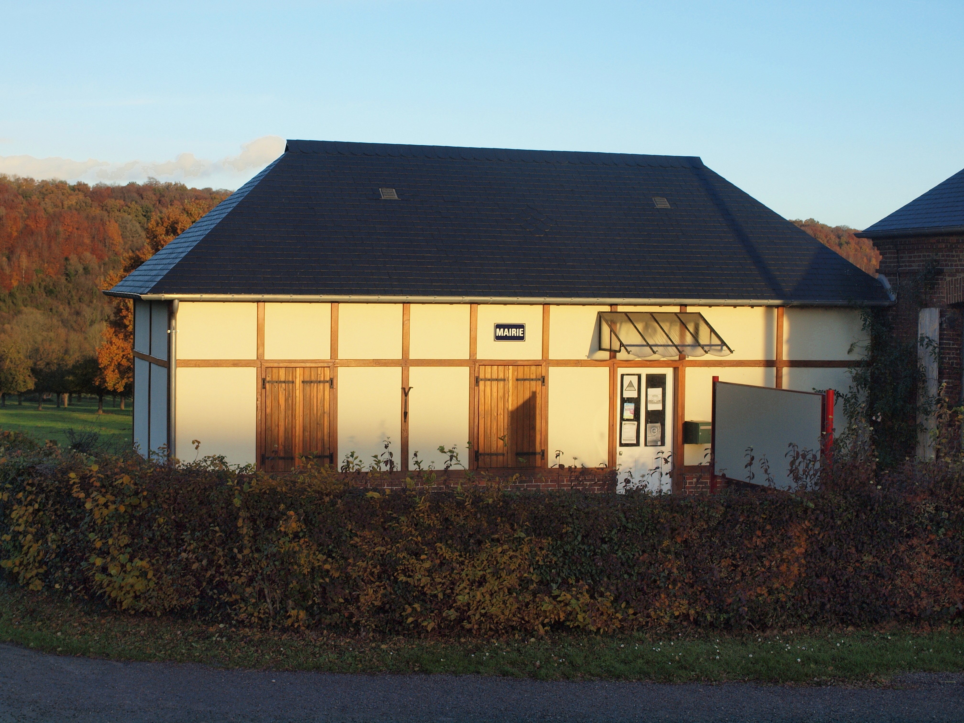 Saint-Valéry-sur-Bresle (Oise, France)